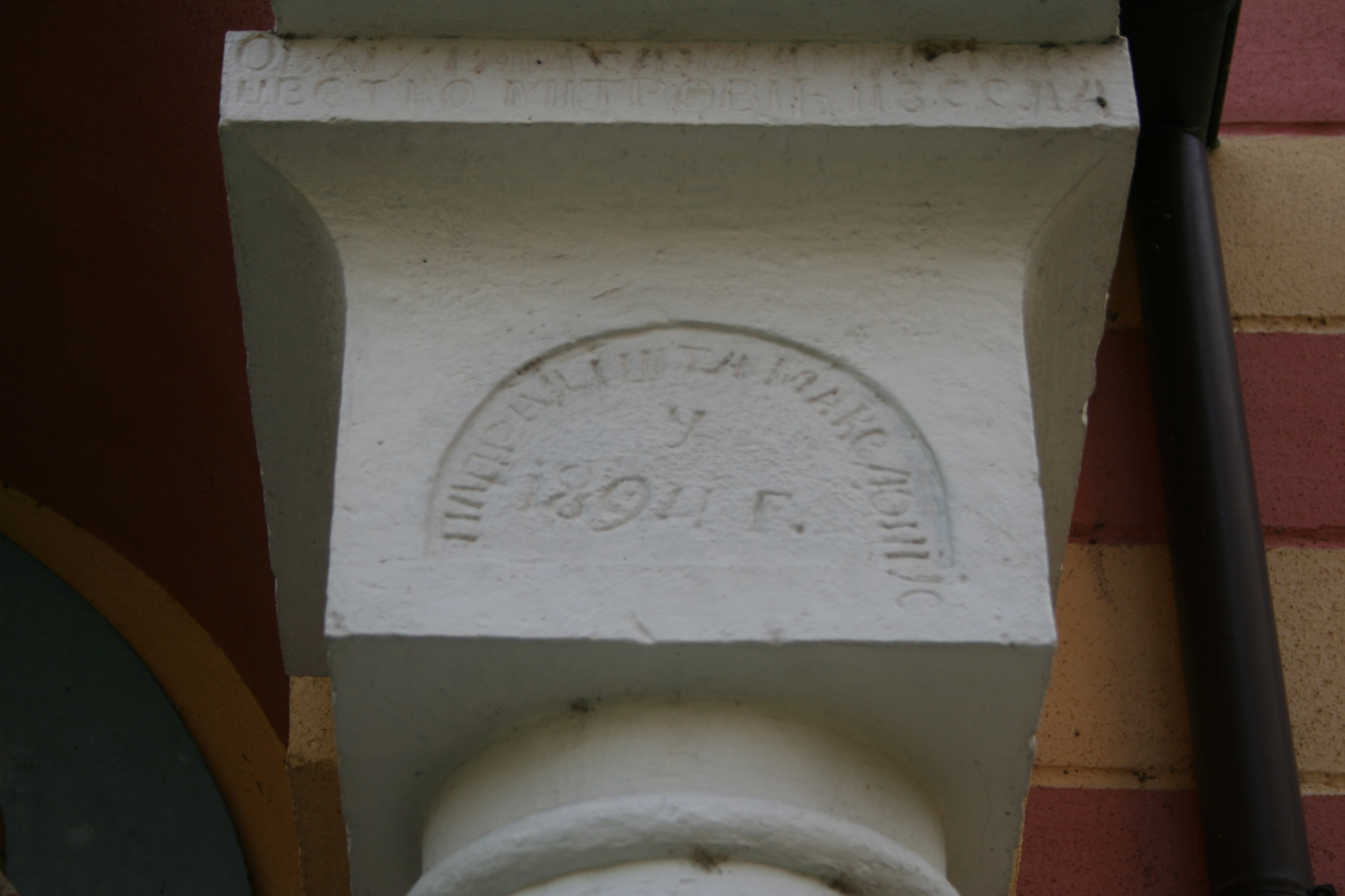 Manastir Grabovac